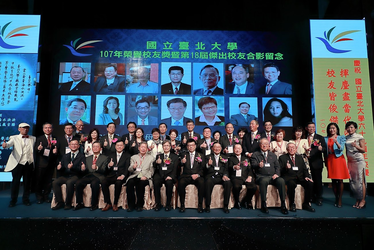 中文（台灣）: NTPU第18屆傑出校友表揚大會